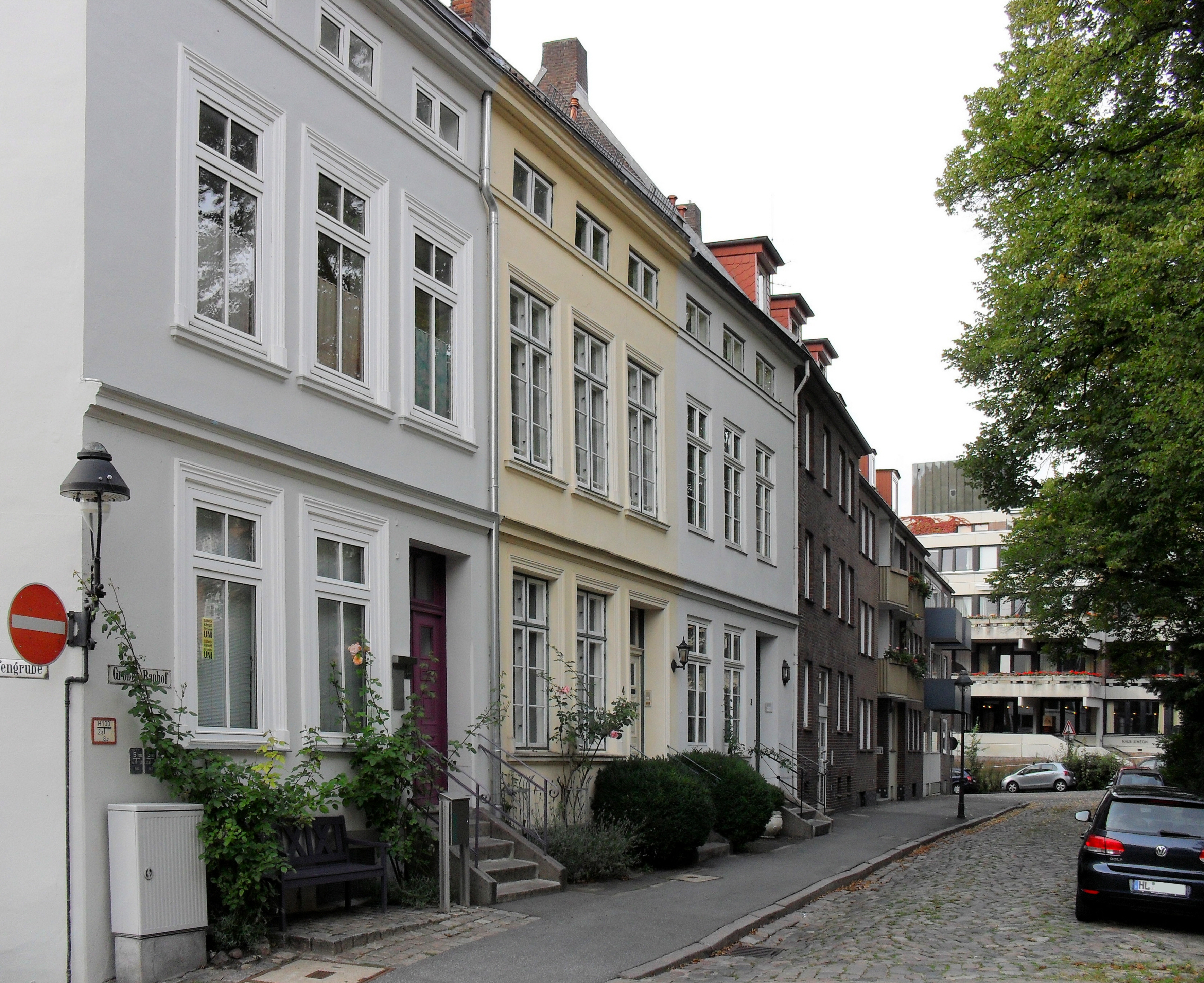 Die Westseite des Großen Bauhofs in Lübeck